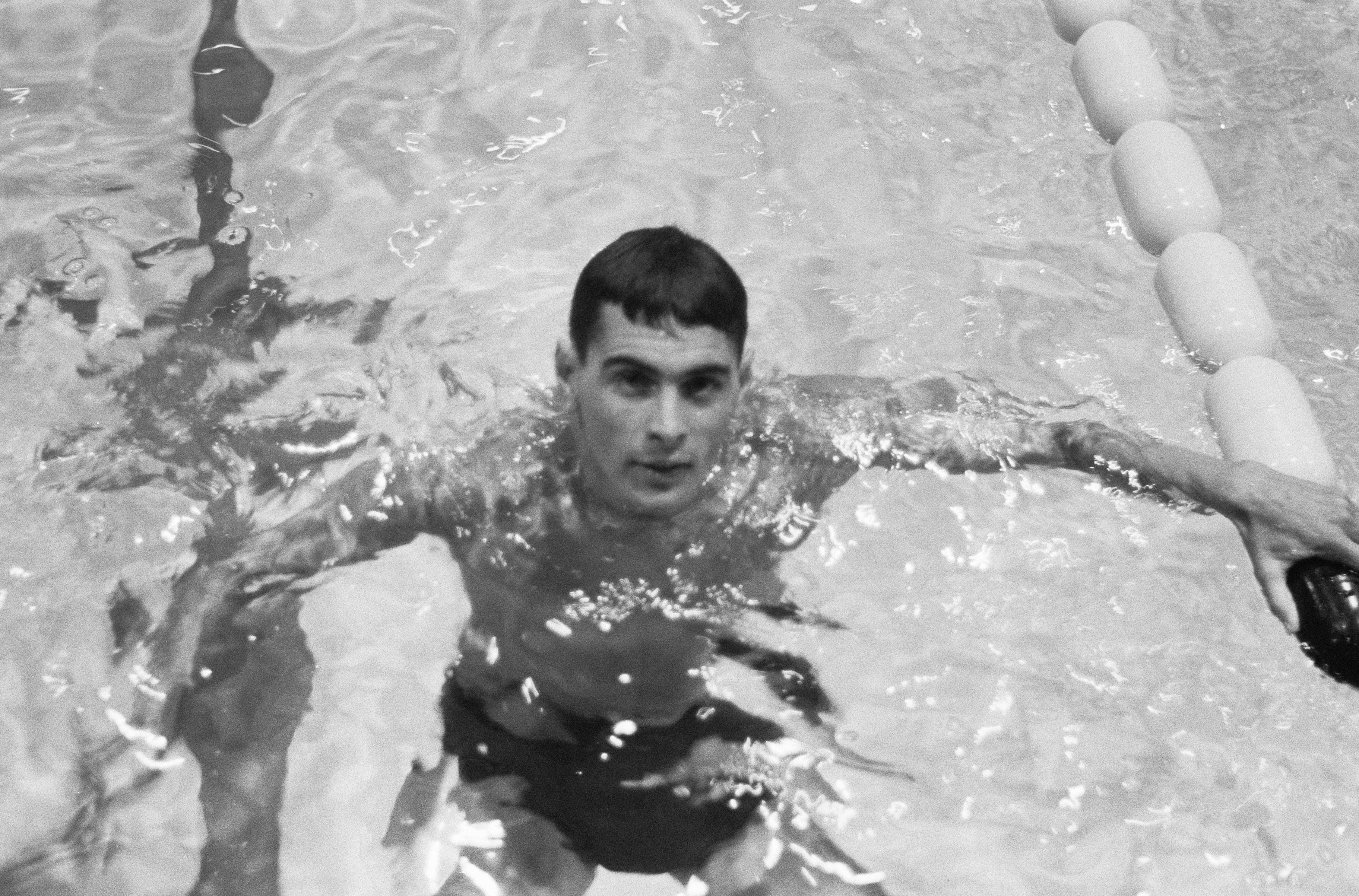 Collectie / Archief : Fotocollectie Anefo Reportage / Serie : [ onbekend ] Beschrijving : Olympische Spelen te Rome, Devitt (Australie) won Olympisch goud op de 100 meter vrije slag Datum : 28 augustus 1960 Locatie : Rome Trefwoorden : sport, zwemmen Persoonsnaam : Devitt, John Fotograaf : Pot, Harry / Anefo Auteursrechthebbende : Nationaal Archief Materiaalsoort : Negatief (zwart/wit) Nummer archiefinventaris : bekijk toegang 2.24.01.05 Bestanddeelnummer : 911-5421